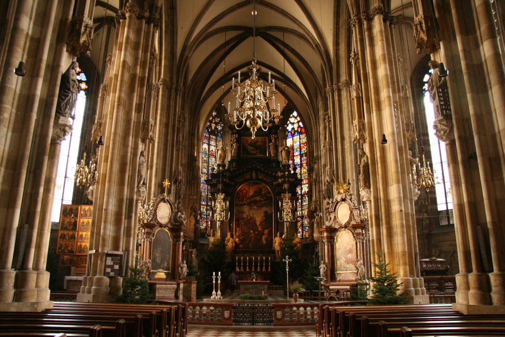 Stephansdom inside